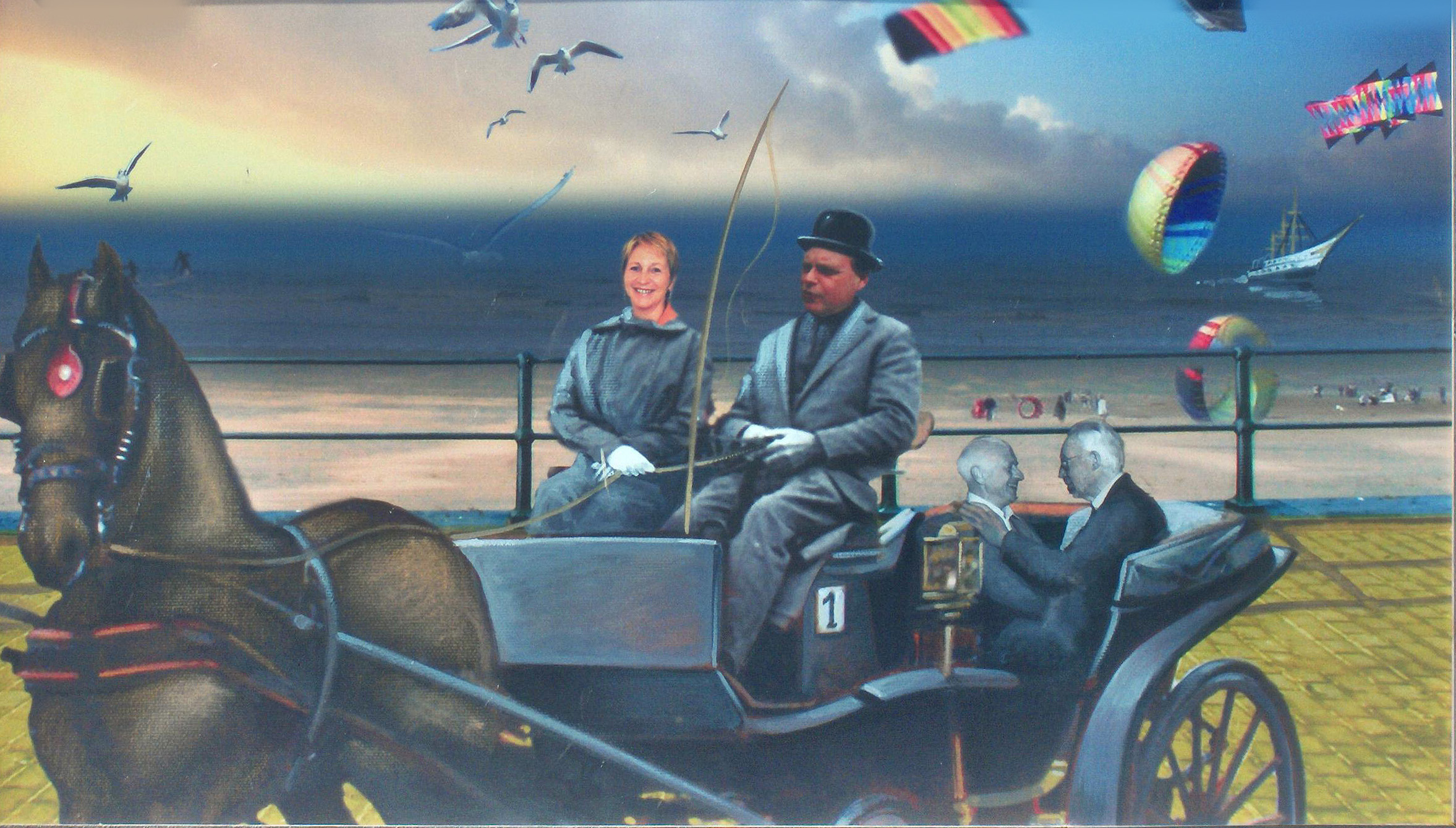 Paardenkoets Op de bok : Jean Vandecasteele, burgemeester van Oostende Achteraan : Raul Servais en Henri Storck Project "Van koning tot koningin" - Trompe l'oeil 2006 Victorialaan, Oosteroever, Oostende, België 1000 x 3500